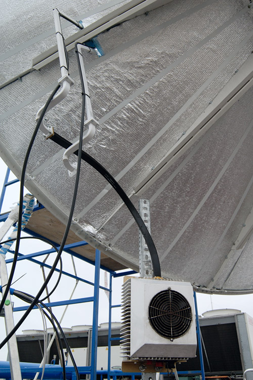 BUC выходной мощностью 25 Ватт на антенне центральной земной станции оператора StarBlazer